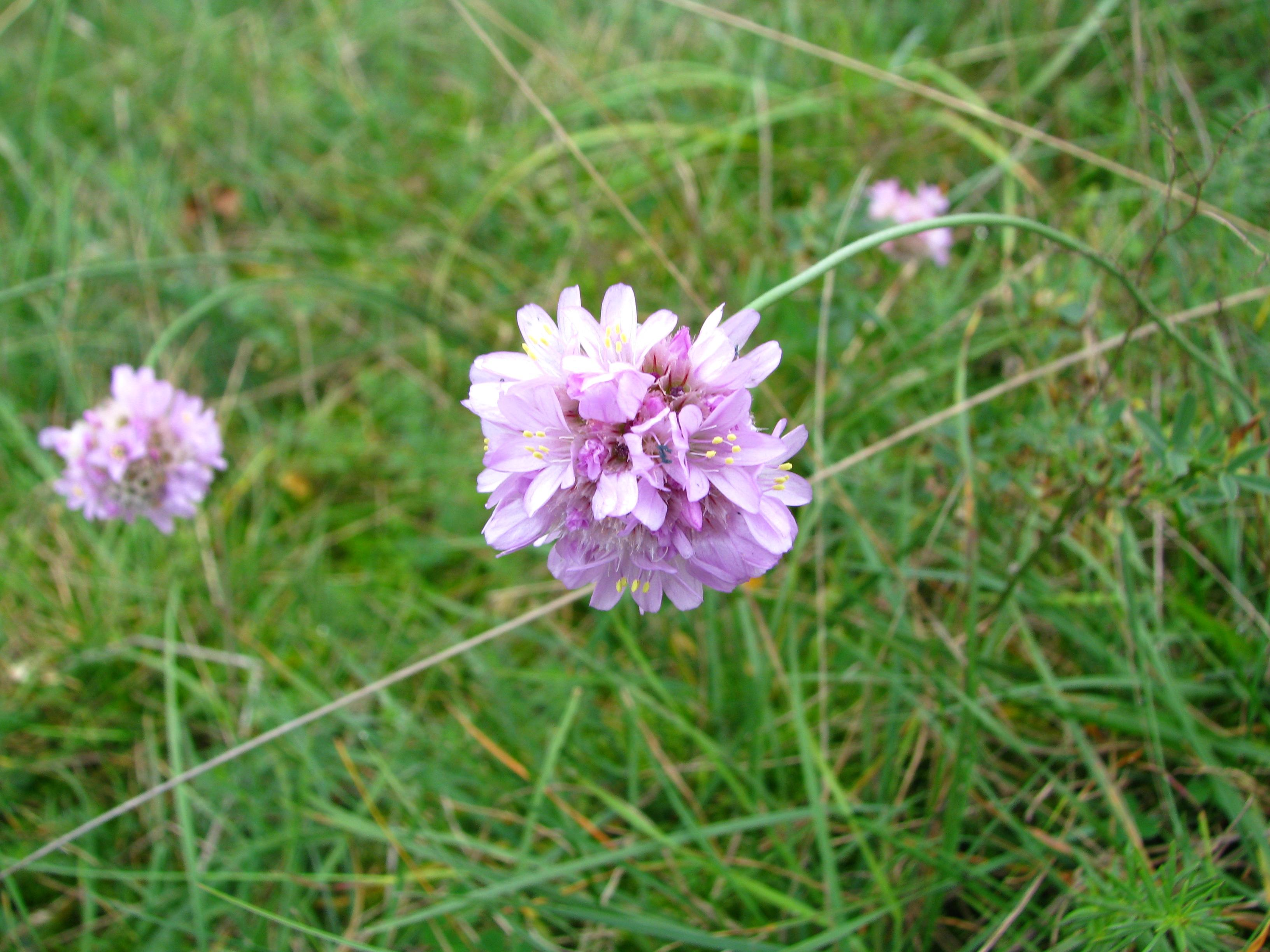 Bottendorfer Grasnelke (Armeria marittima var. bottendorfensis).